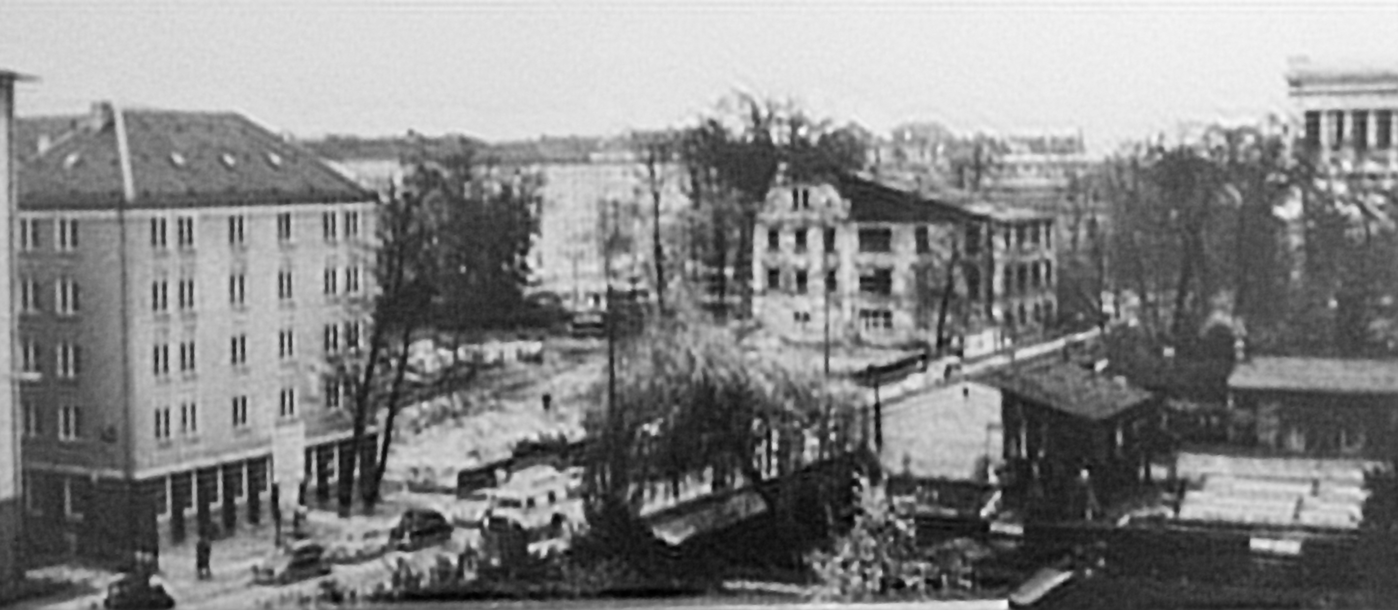 Rhaetenhaus